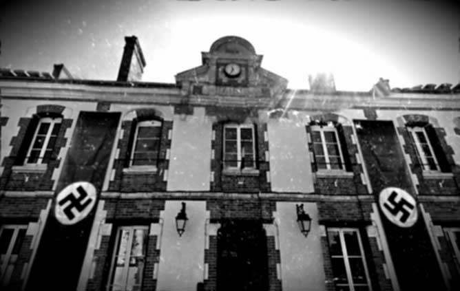 Banderoles nazies sur la mairie pendant l'occupation nazie.